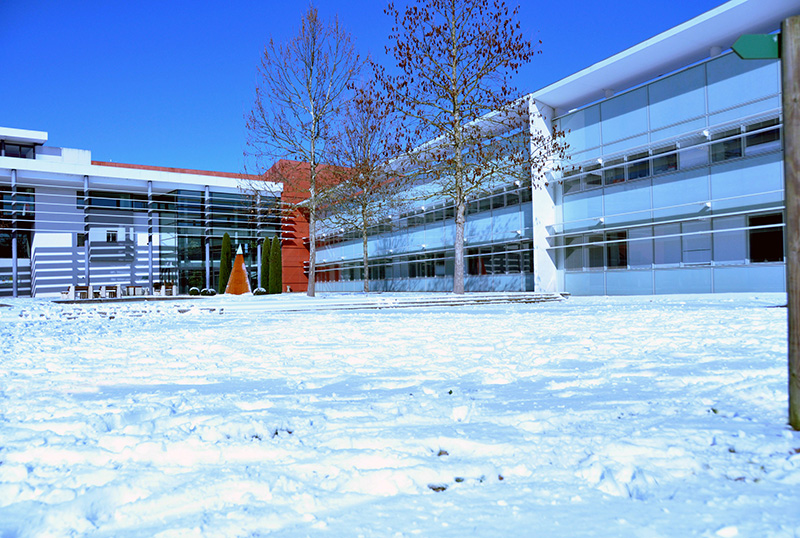 L'Enap en hiver